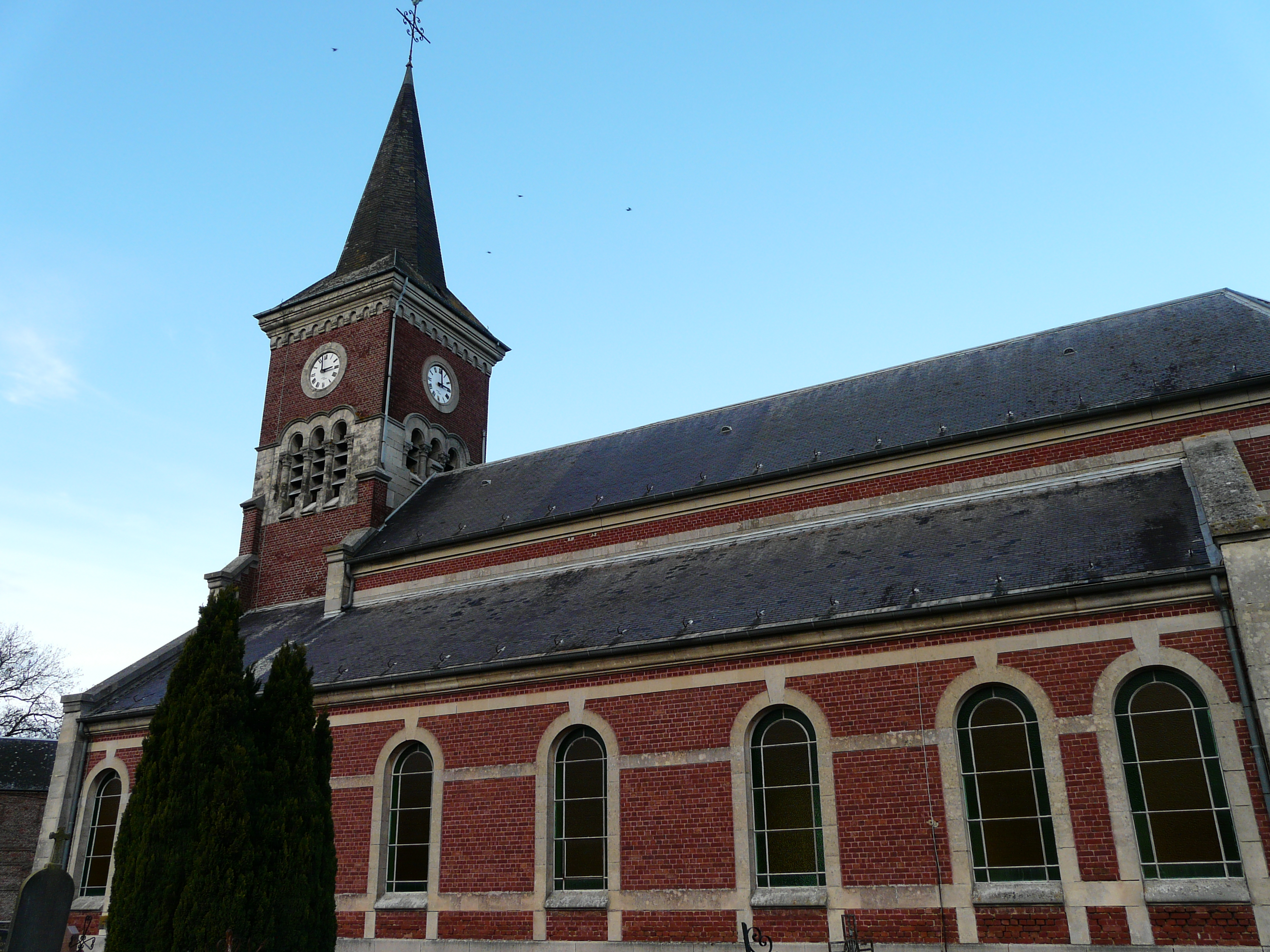 L'église de Blécourt (Nord)